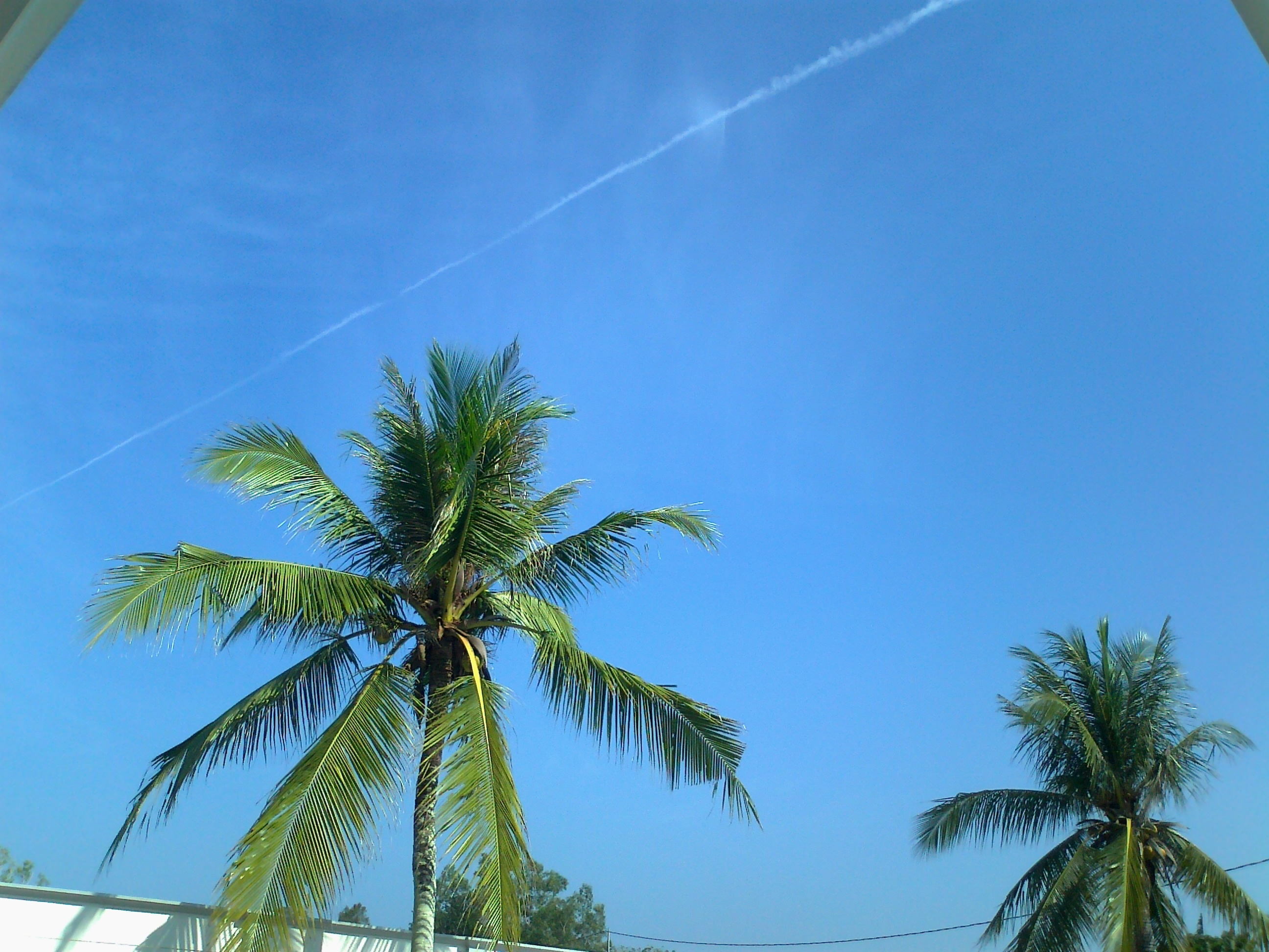 Foto ini diambil dekat dengan Bandara Cilik Riwut Palangka Raya di depan rumah.